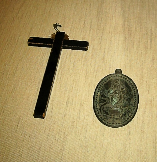 Personal photograph, Sendai Museum.